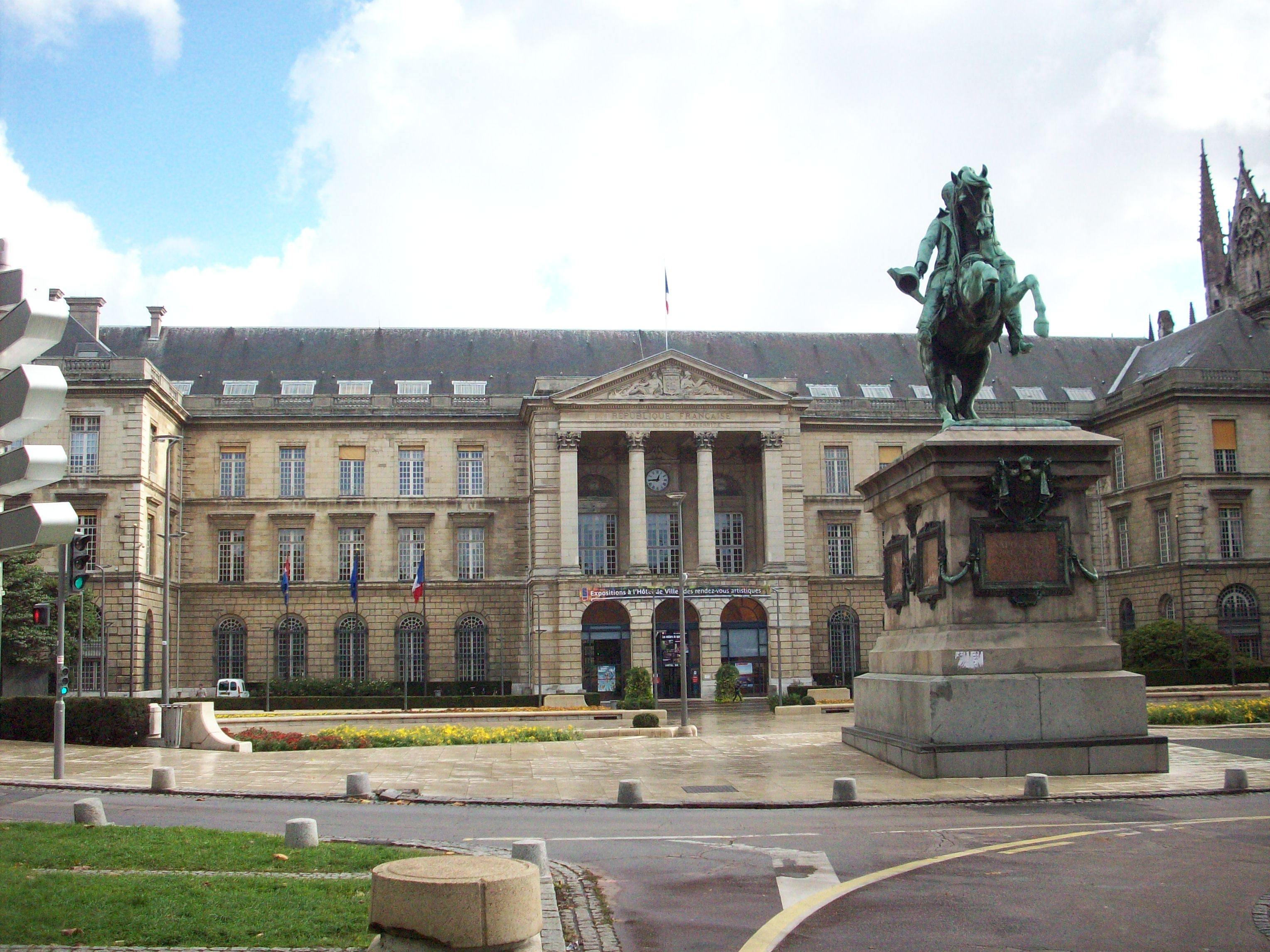 Hôtel de ville de Rouen.